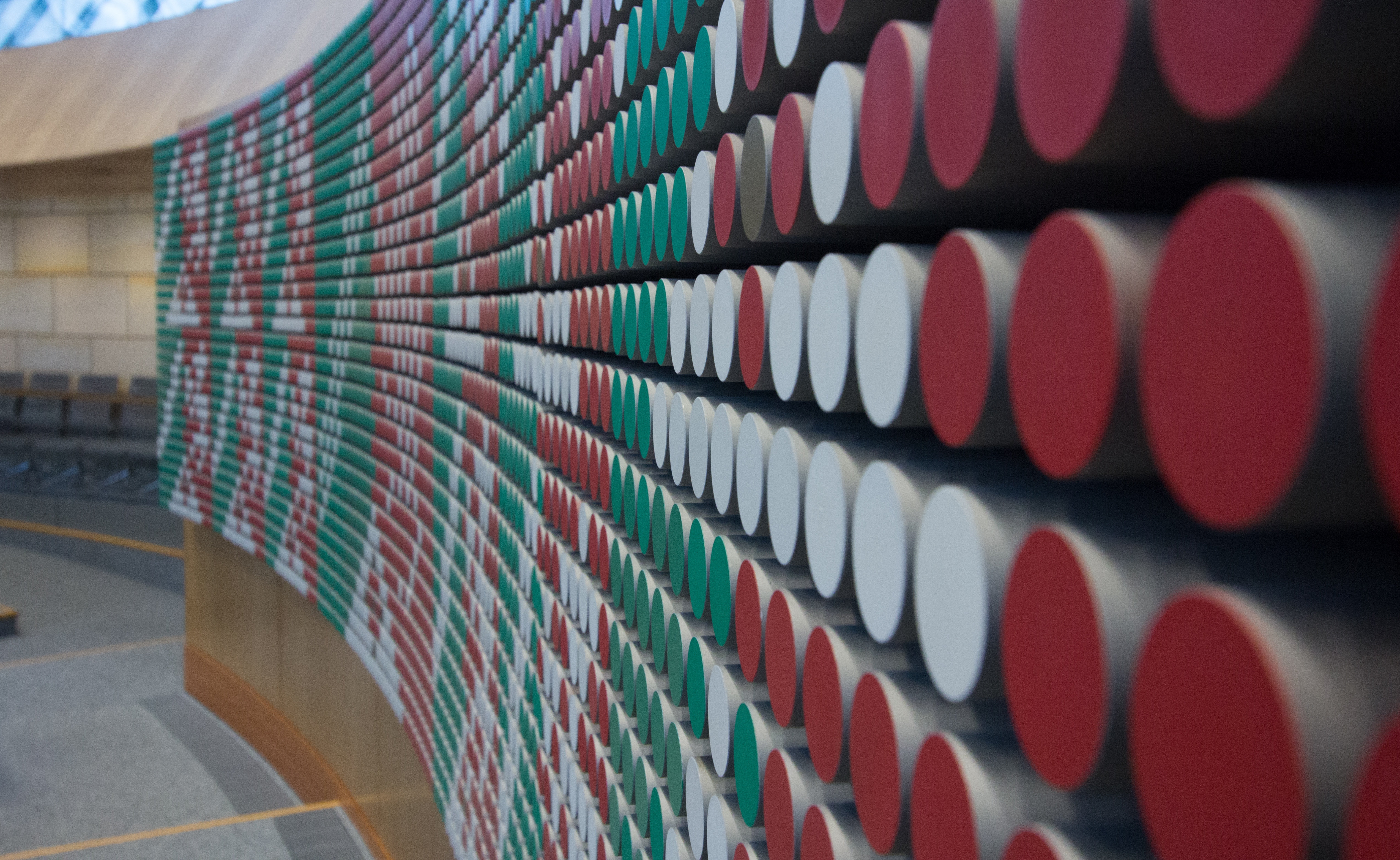 Plenarsaal im Landtag Nordrhein-Westfalen am 2.November 2017